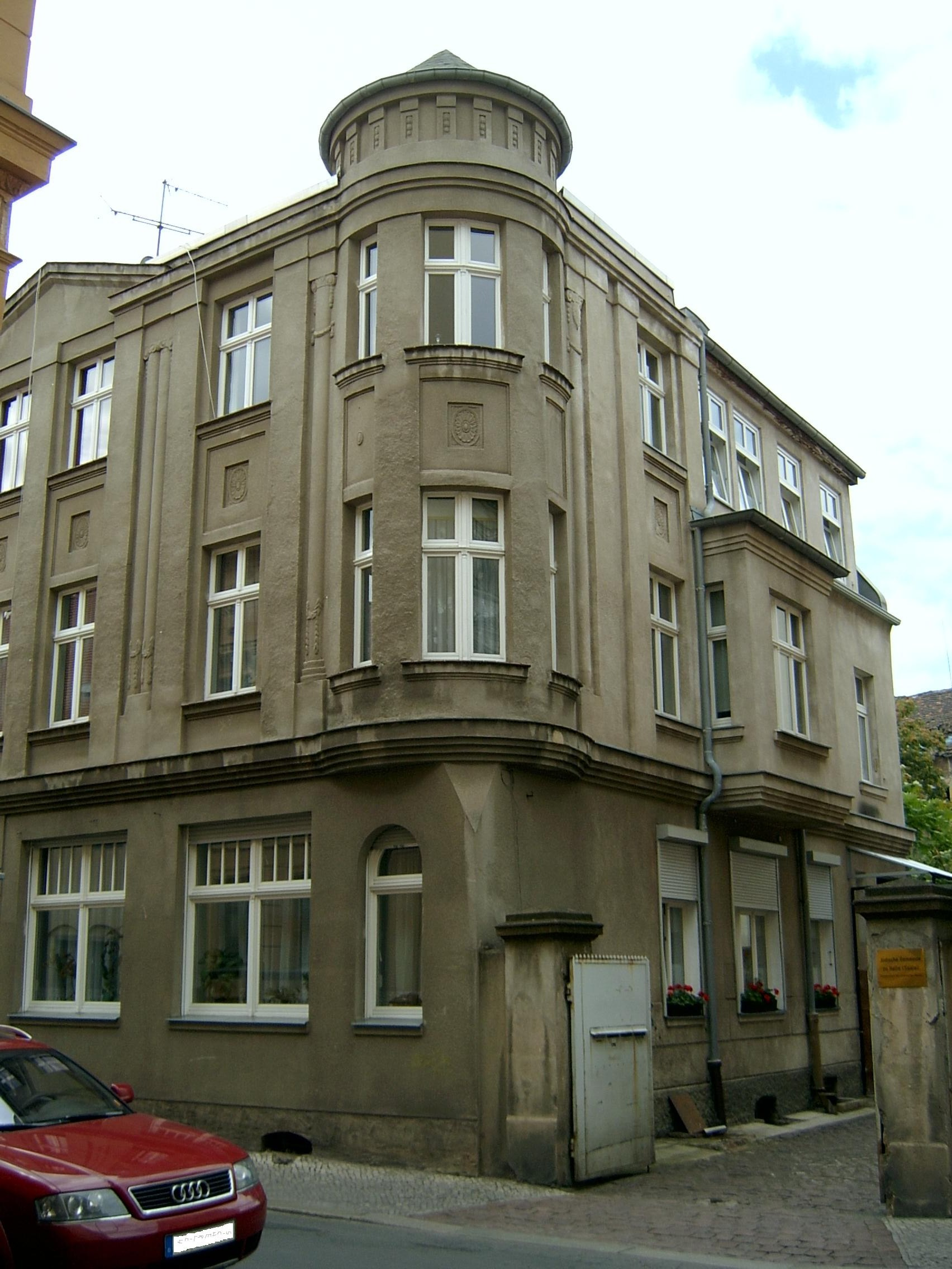 Große Märkerstraße 13a in Halle (Saale)